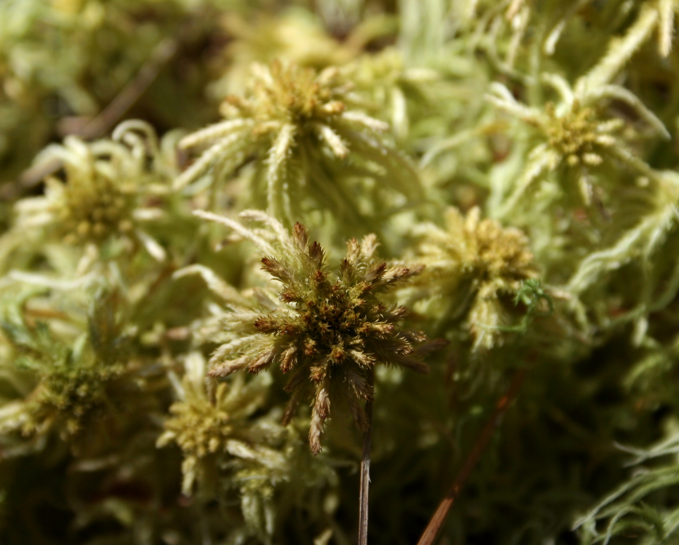 torfowiec, prawdopodobnie Sphagnum fuscum w rezerwacie Dury, Wdecki Park Krajobrazowy